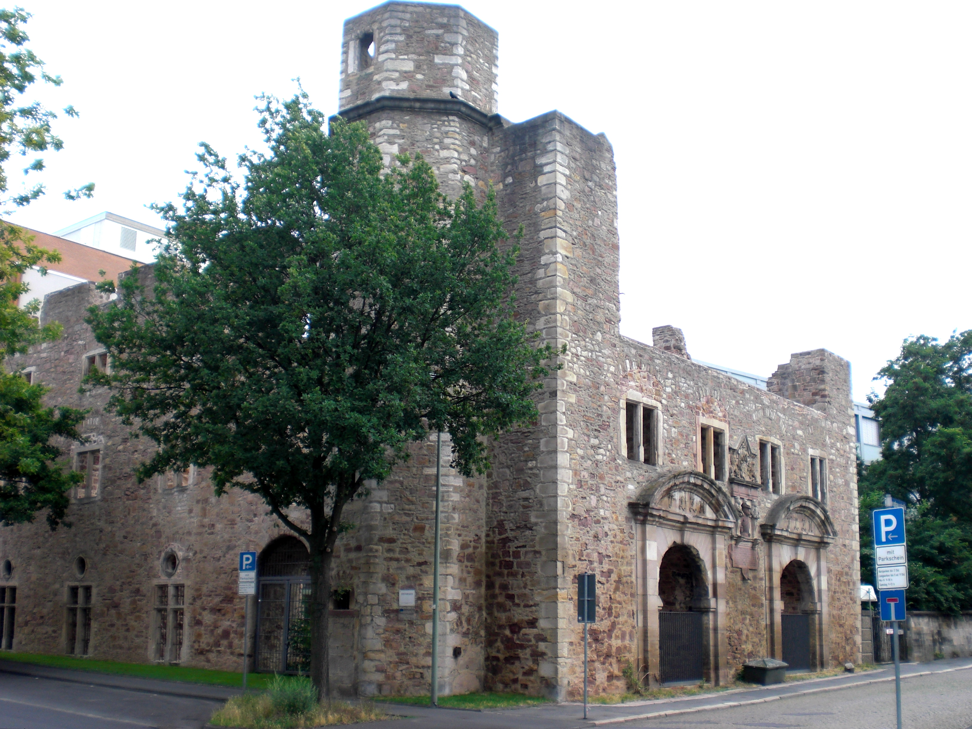 Fassade des Kasseler Zeughauses